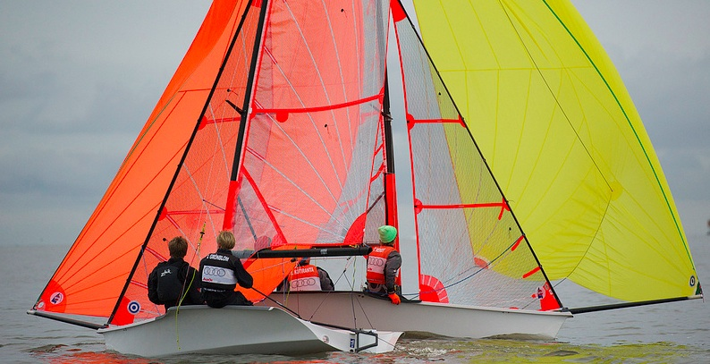 HSS juniorer seglar 29er